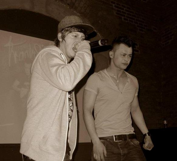 Manuel Hoffelner und Lukas Plöchl von Trackshittaz. CD Release Party 12. Februar 2012